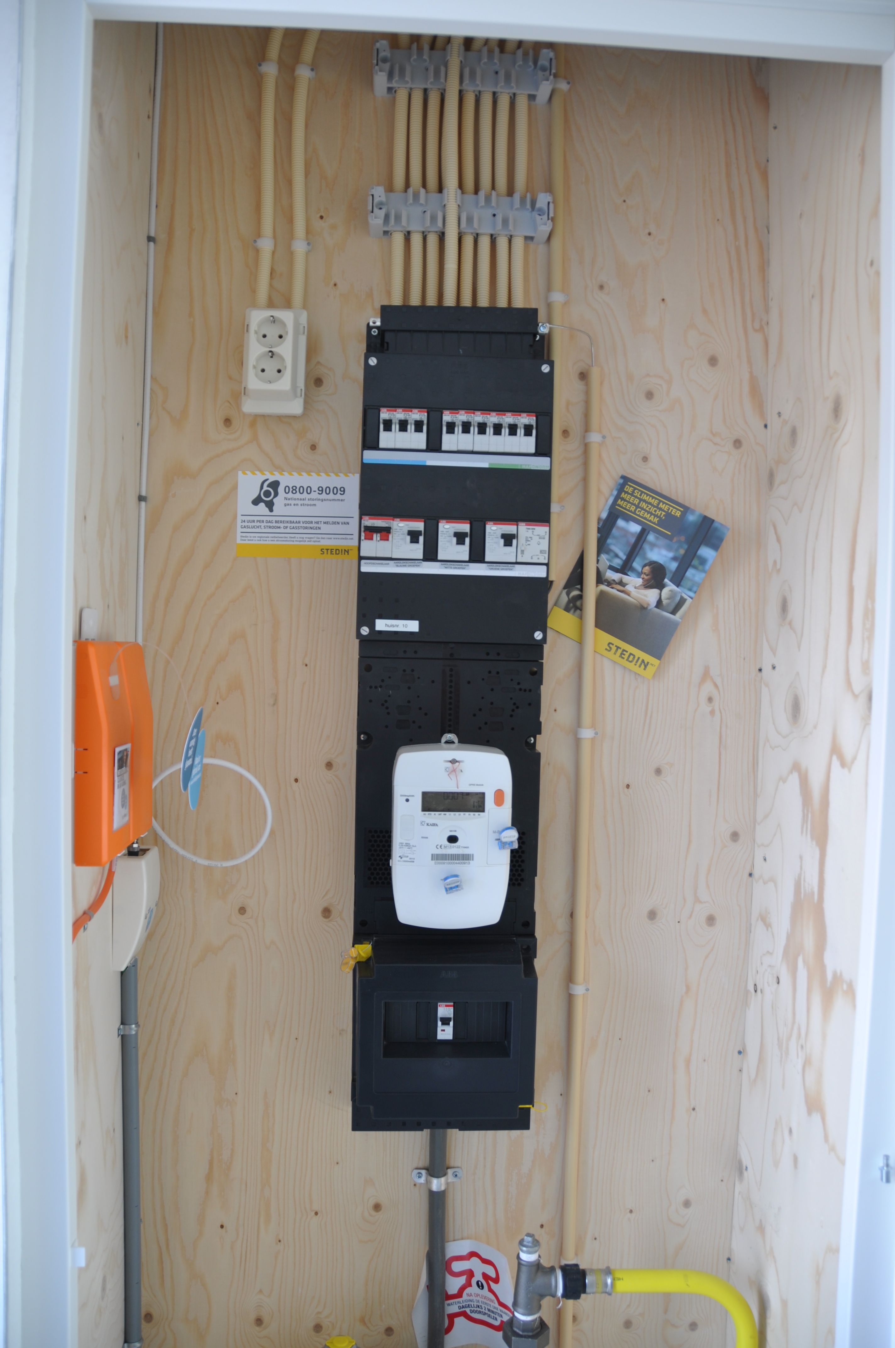 De Oosterscheldestraat (Berkel en Rodenrijs) status 28 april 2014.